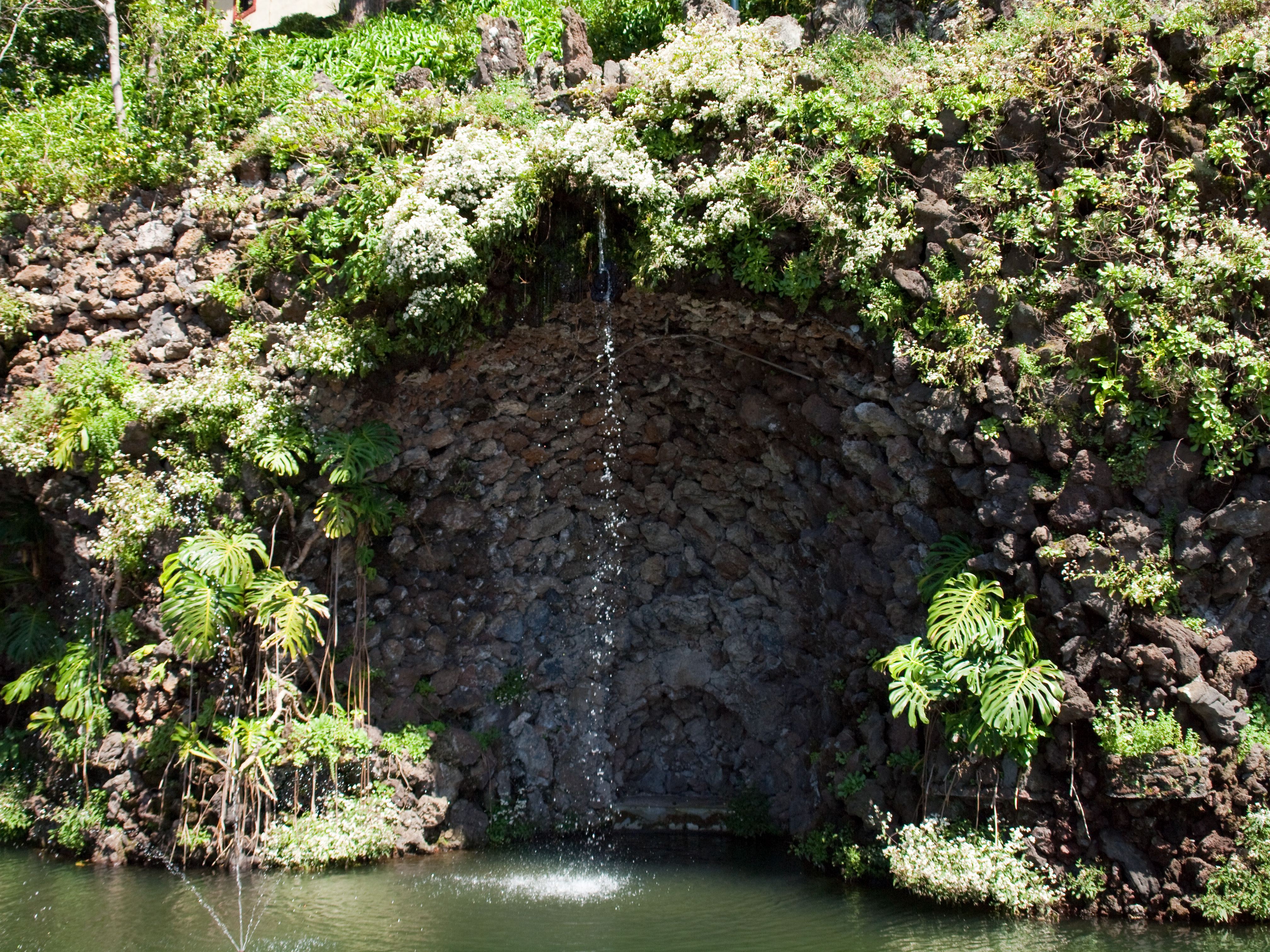 Artificial cave in Jardim do Monte - Funchal, Madeira Island